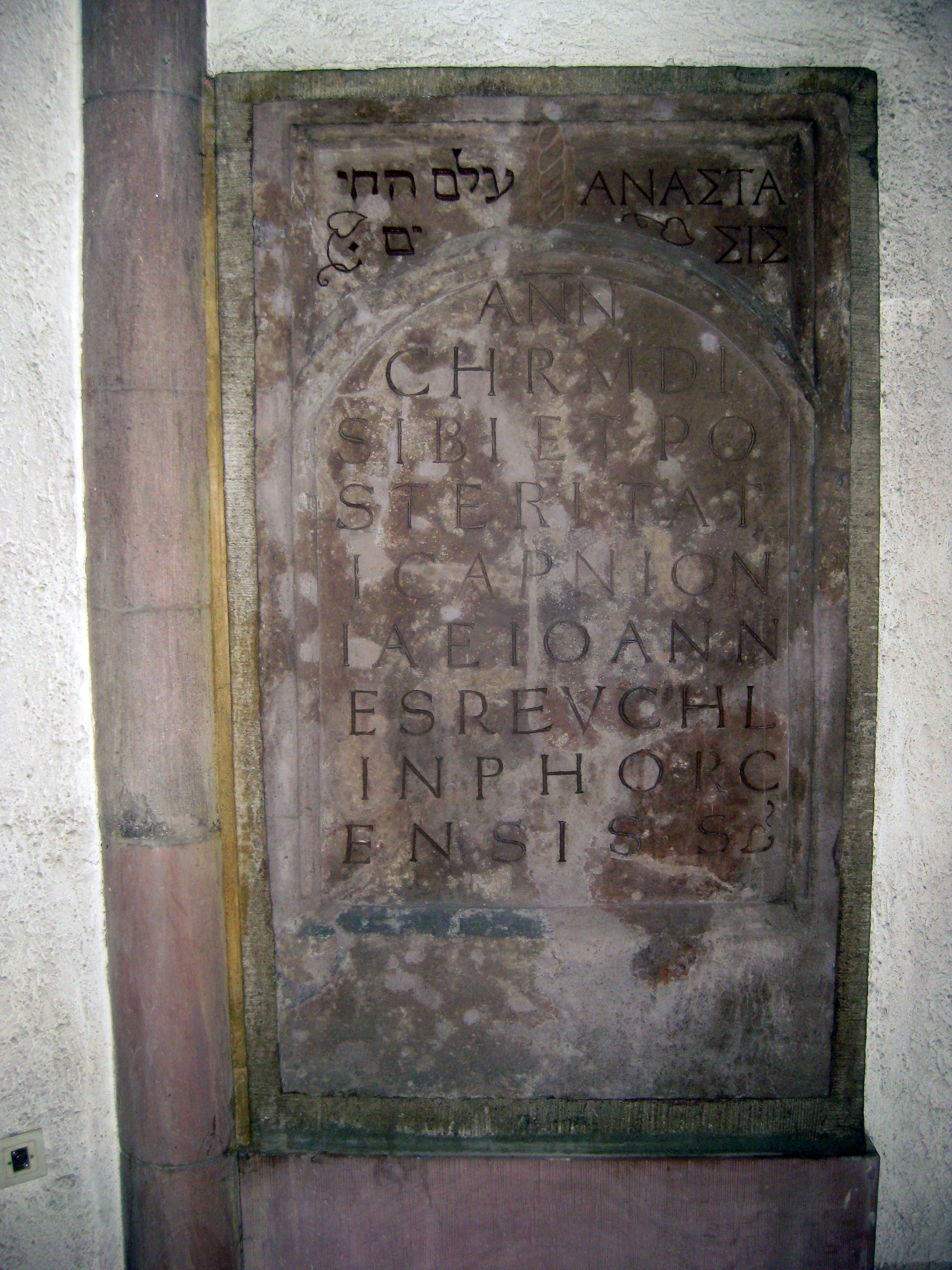 Grabplatte vom Epitaph von Johannes Reuchlin, 1501, ab 1949 im Städtischen Lapidarium Stuttgart, Inventarnummer 24, seit 1955 in der Leonhardskirche. Das Foto zeigt die eingemauerte Grabplatte in der Leonhardskirche.